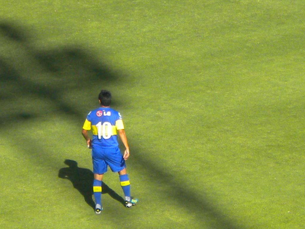 Leandro Gracián en un encuentro de División Reserva en el estadio de Boca Juniors.